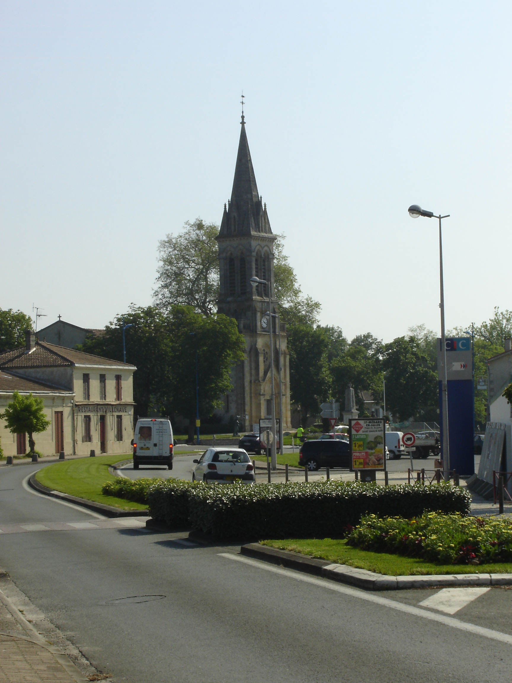 Église de Saint-Jean-d'Illac (Gironde, France). Construction terminée en 1861.